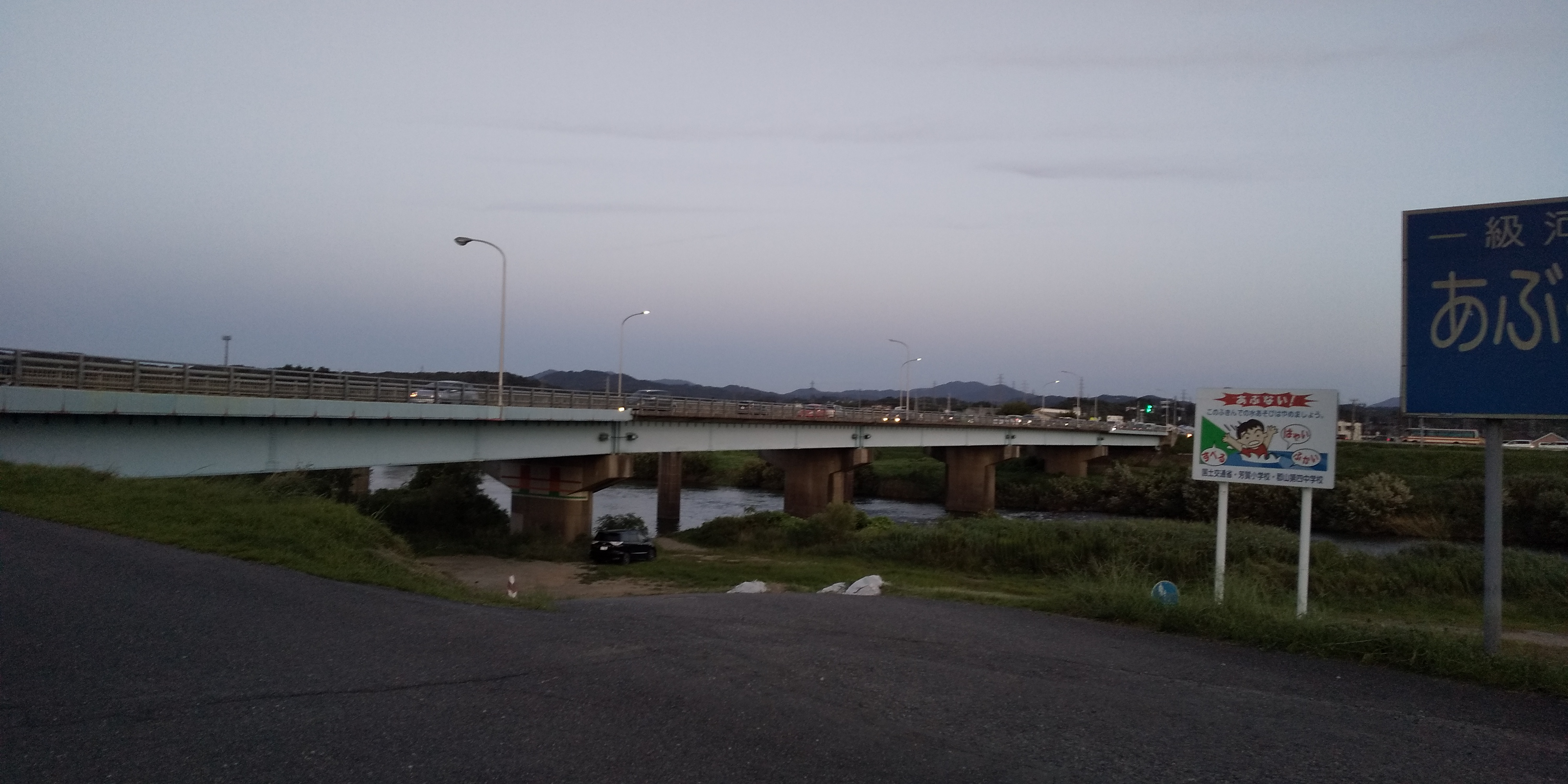 左岸上流側より